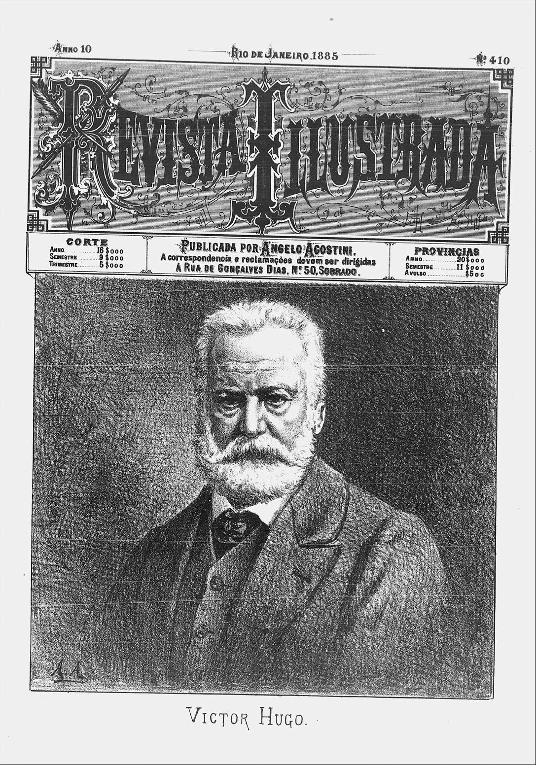 Revista Illustrada. Rio de Janeiro- [s.n], ano 10, n. 410, 1885.